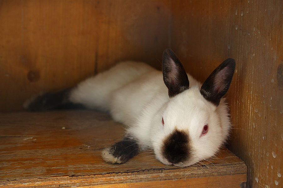 Ein junges Russenkaninchen, noch nicht völlig ausgefärbt.